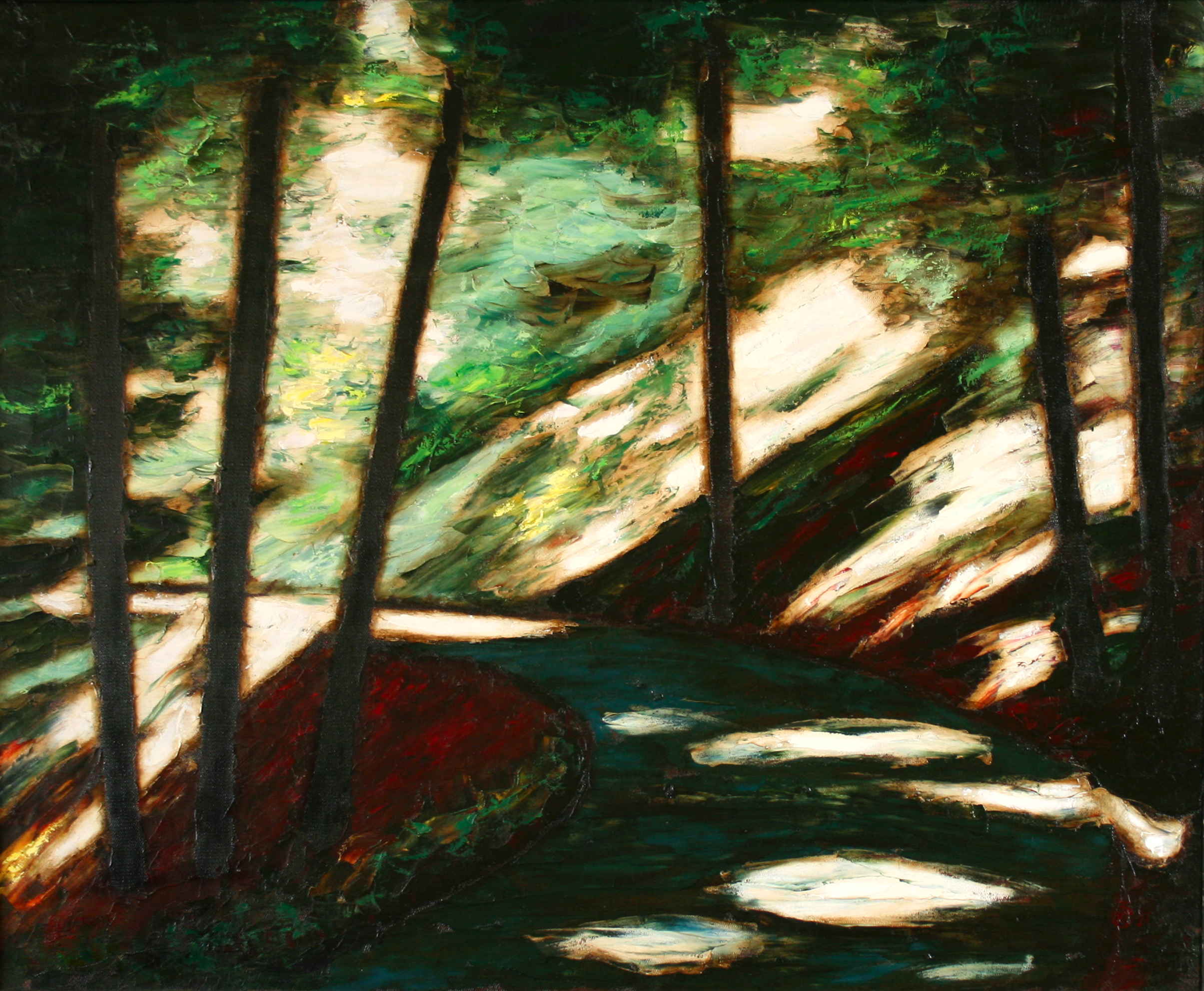 Картина Галины Каковкиной "Свет. Фрагмент №30", 1996г, холст/масло, размер 70*80см Painting by Galina Kakovkina "Light. Fragment #30" oil on canvas, 70x80